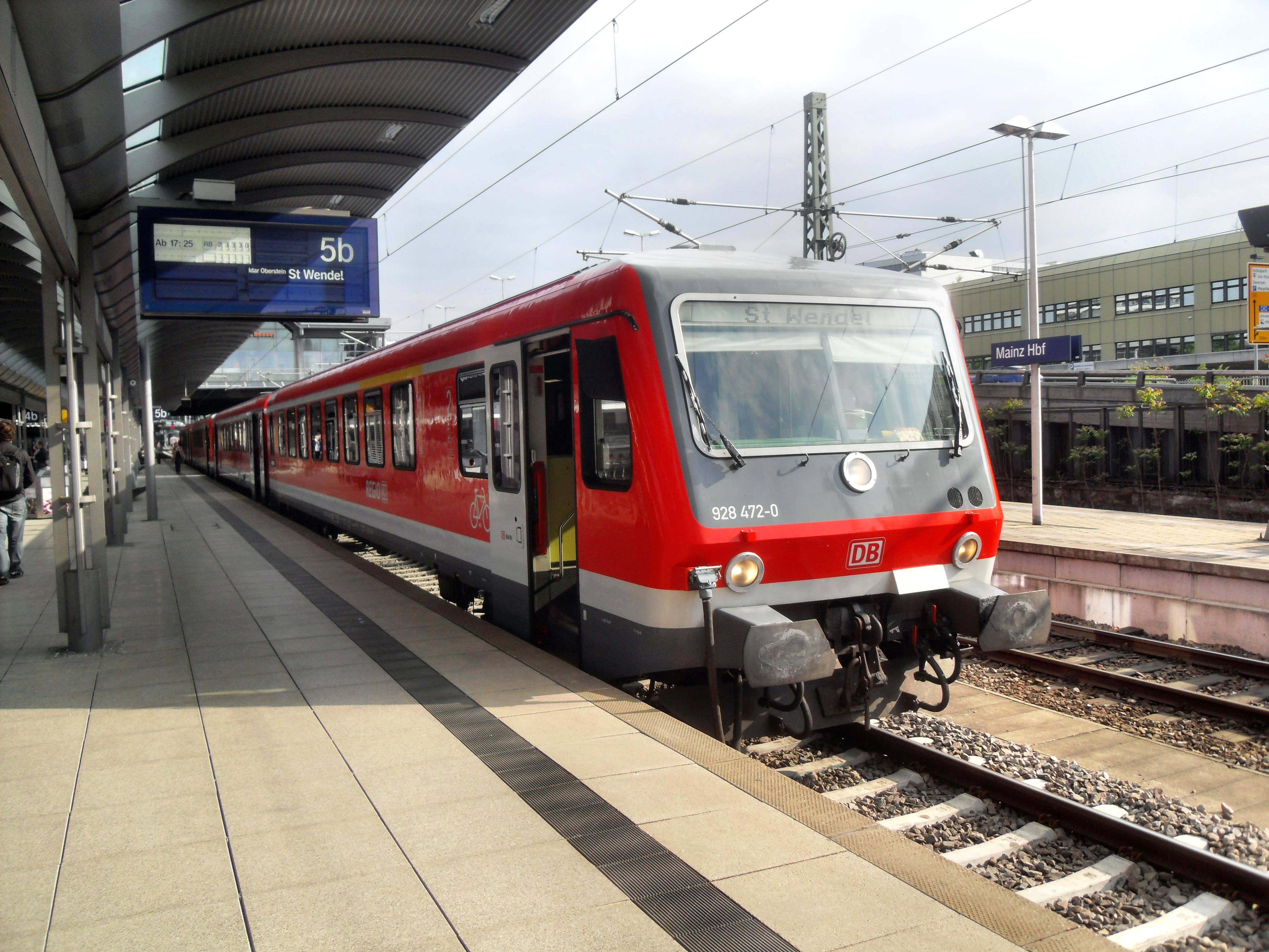 Regionalbahn der Baureihe 628 im Mainzer Hauptbahnhof auf dem Weg nach St. Wendel